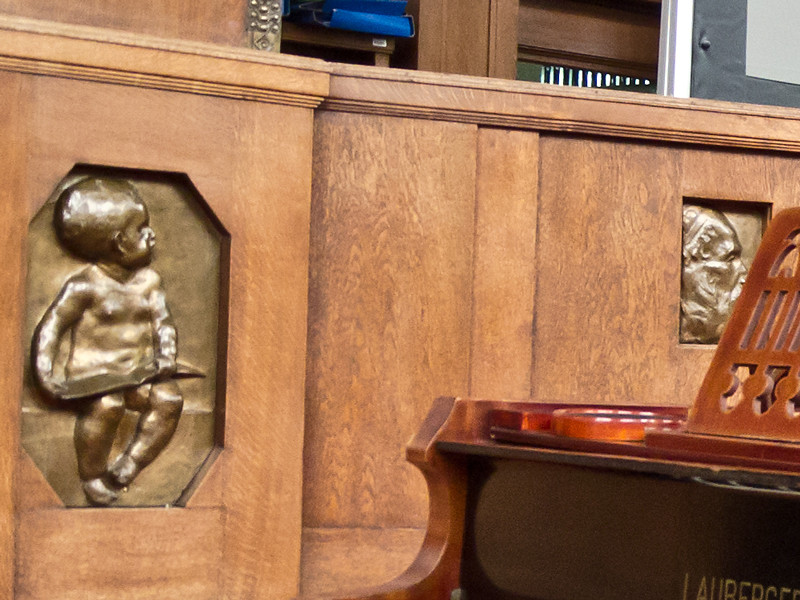 Hrvatski državni arhiv